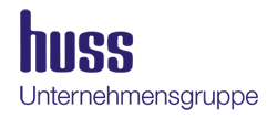 Logo HUSS Gruppe